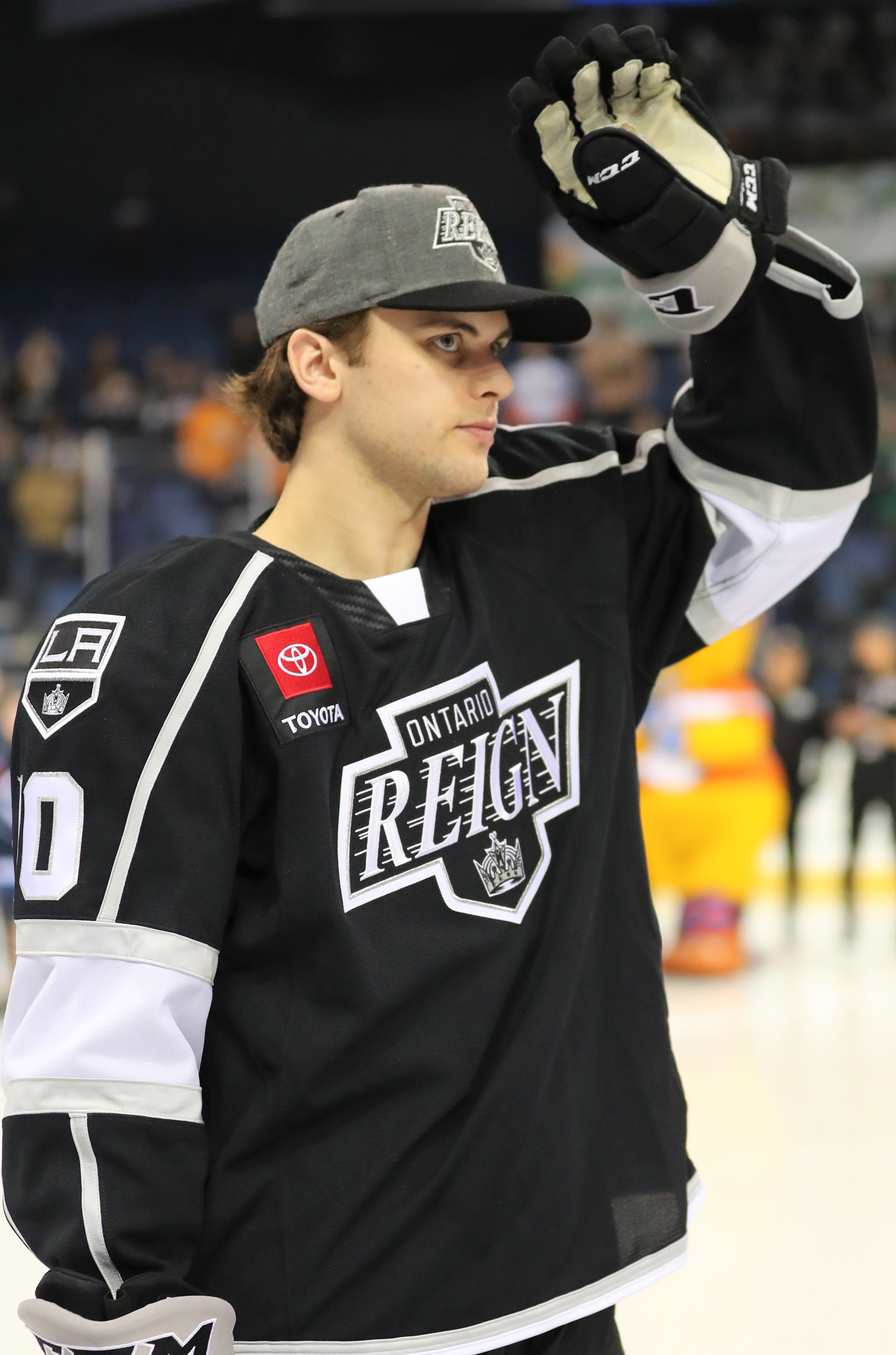 AA3I0967